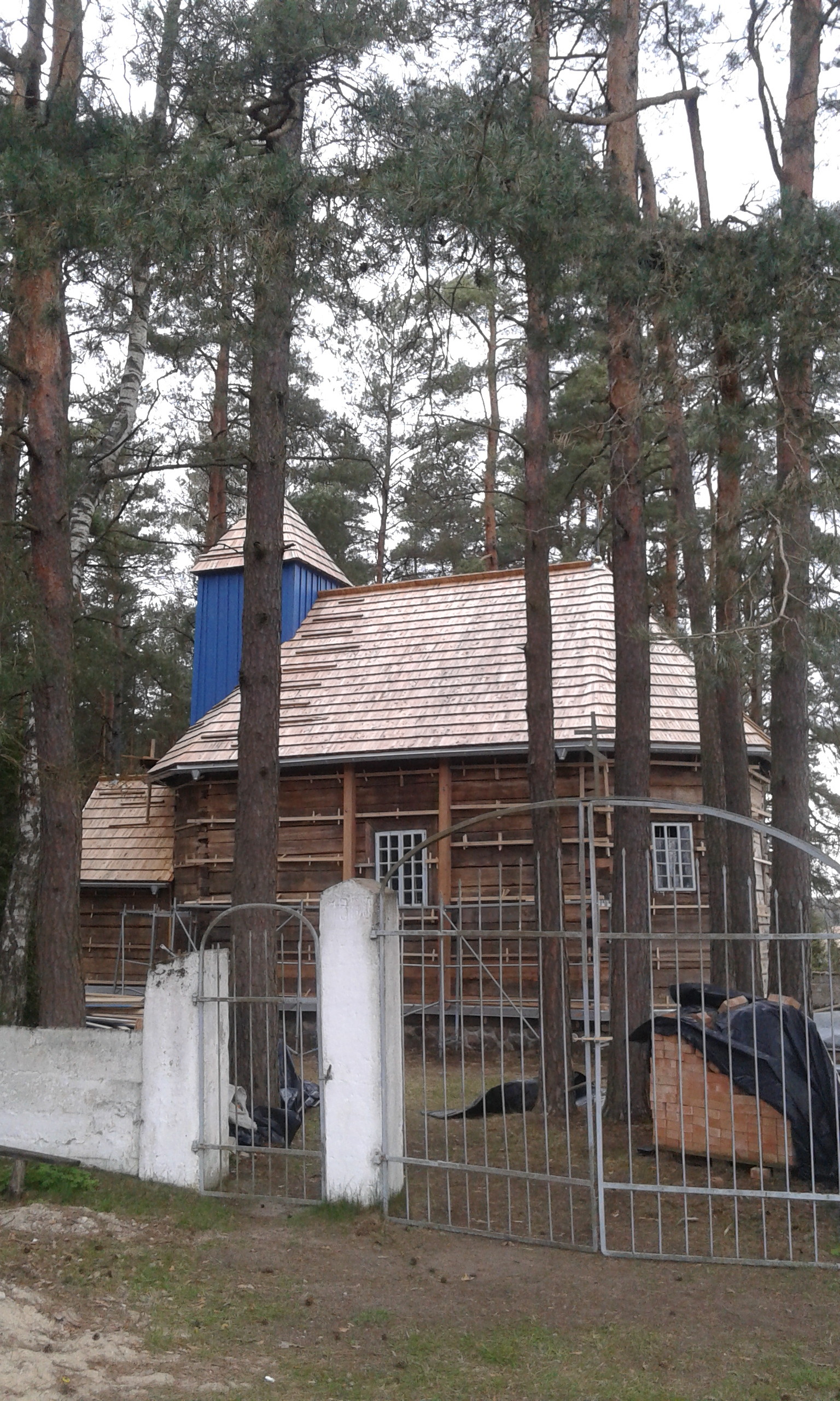 Kaplica p.w. św. Mikołaja w Koźlikach Беларуская (тарашкевіца): Сьвятамікалаеўская капліца ў Козьліках